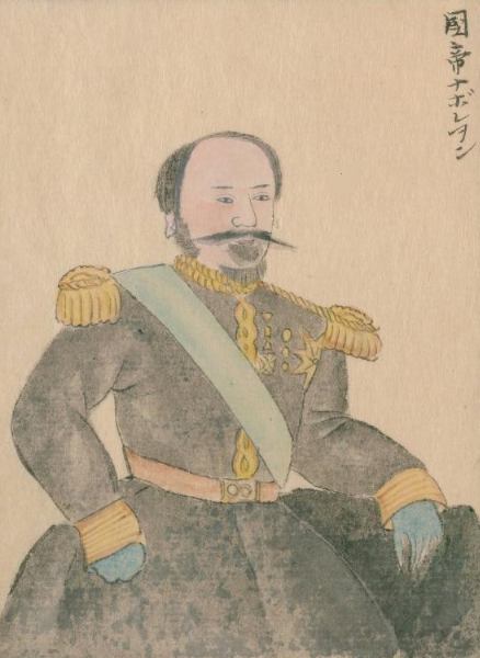 ナポレオン3世 高嶋祐啓『欧西行紀』